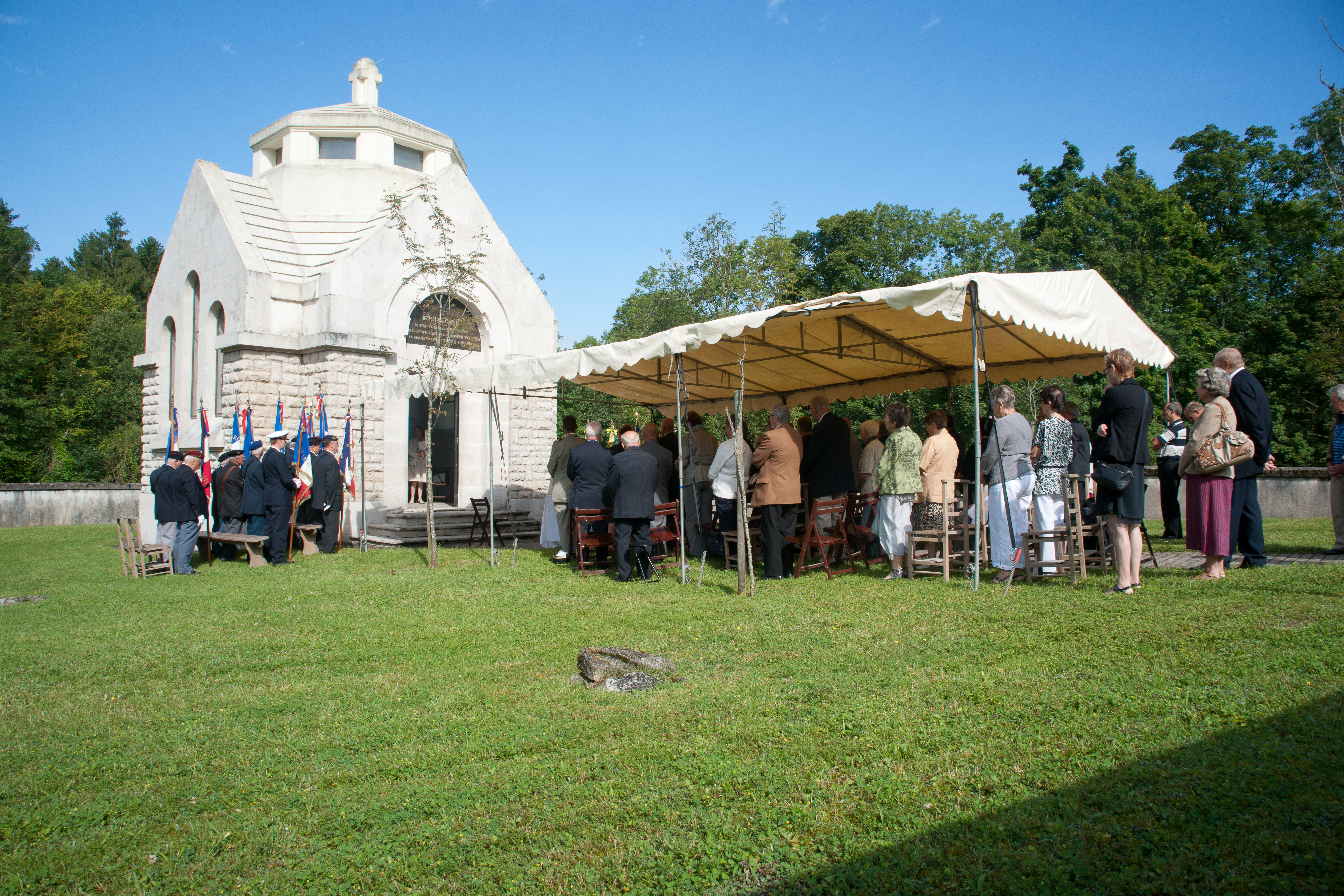 Louvemont-Côte-du-Poivre - cérémonie